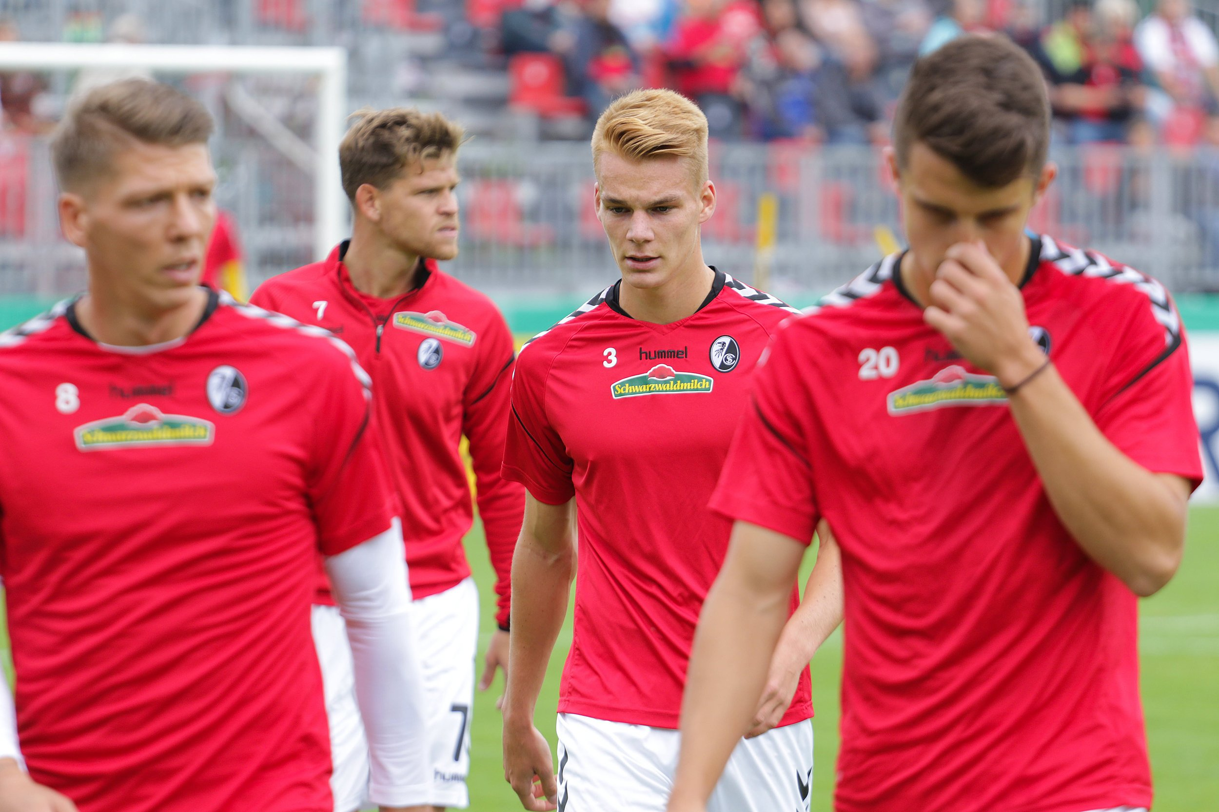 Philipp Lienhart beim DFB-Pokalspiel VfB Germania Halberstadt vs. SC Freiburg